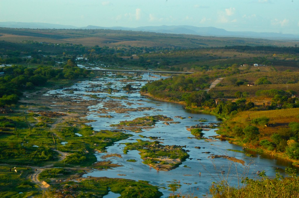 Rio Ipanema, Afluente do São Francisco